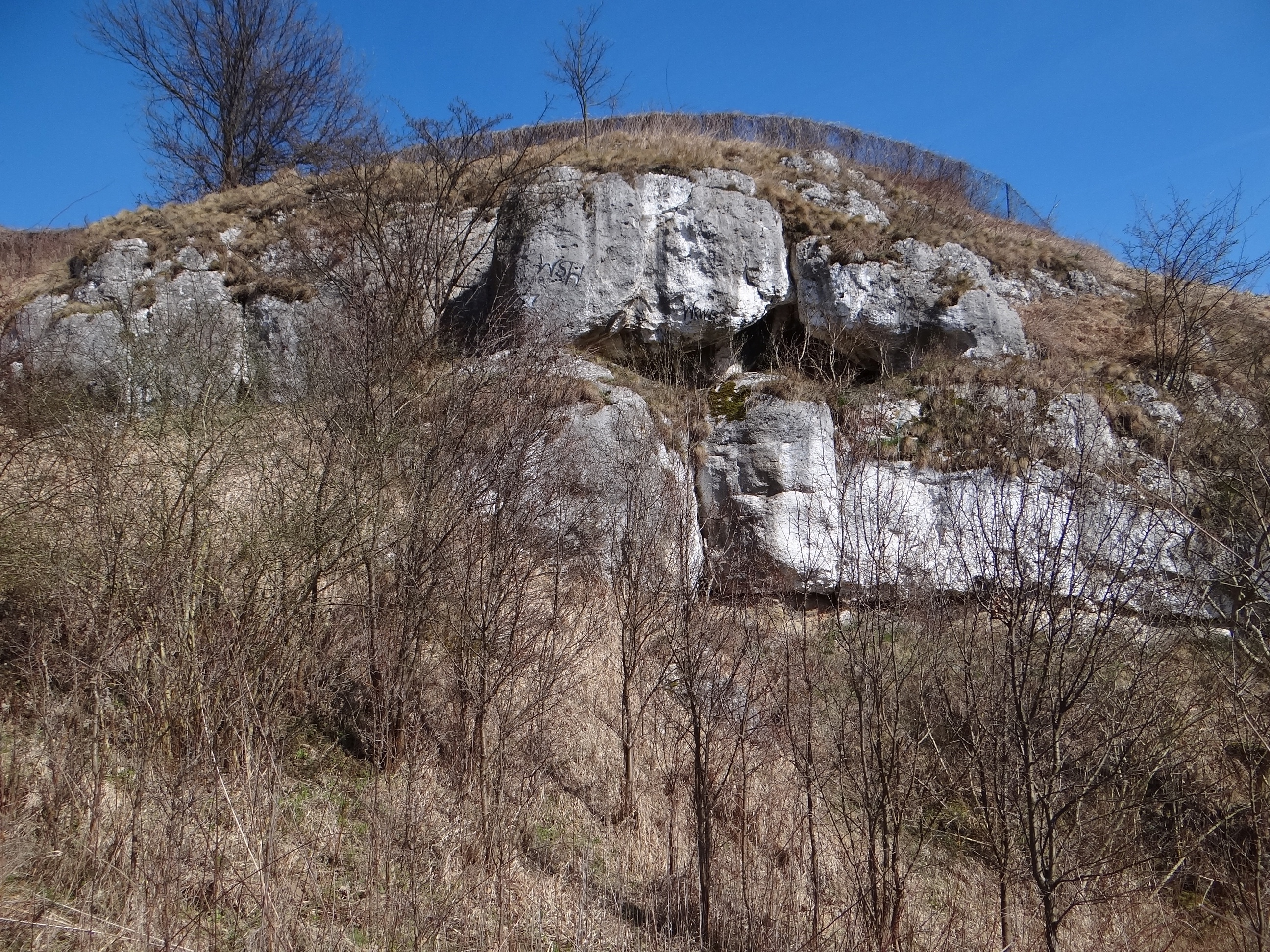 Jaskinia nad Galoską